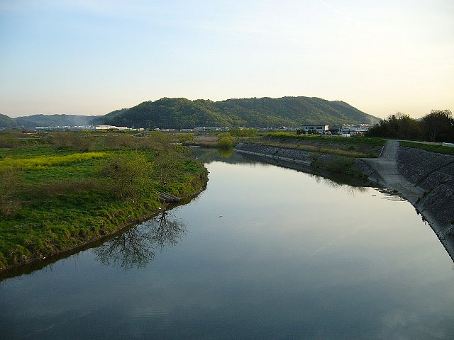 小田川 観音橋（矢掛町・笠岡市）より西望